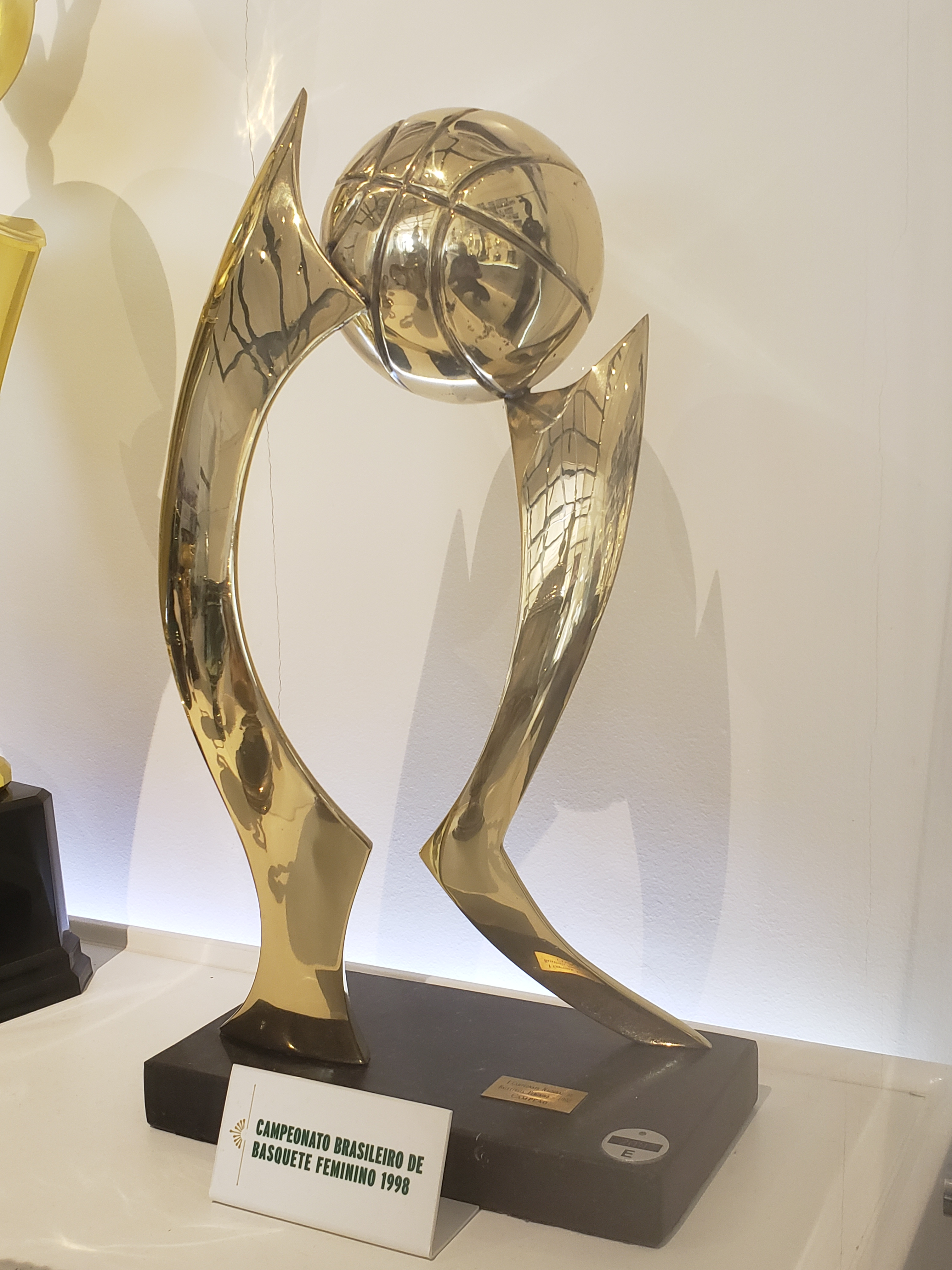 Campeonato Brasileiro de Basquete Feminino de 1998 conquistado pelo Fluminense Football Club.